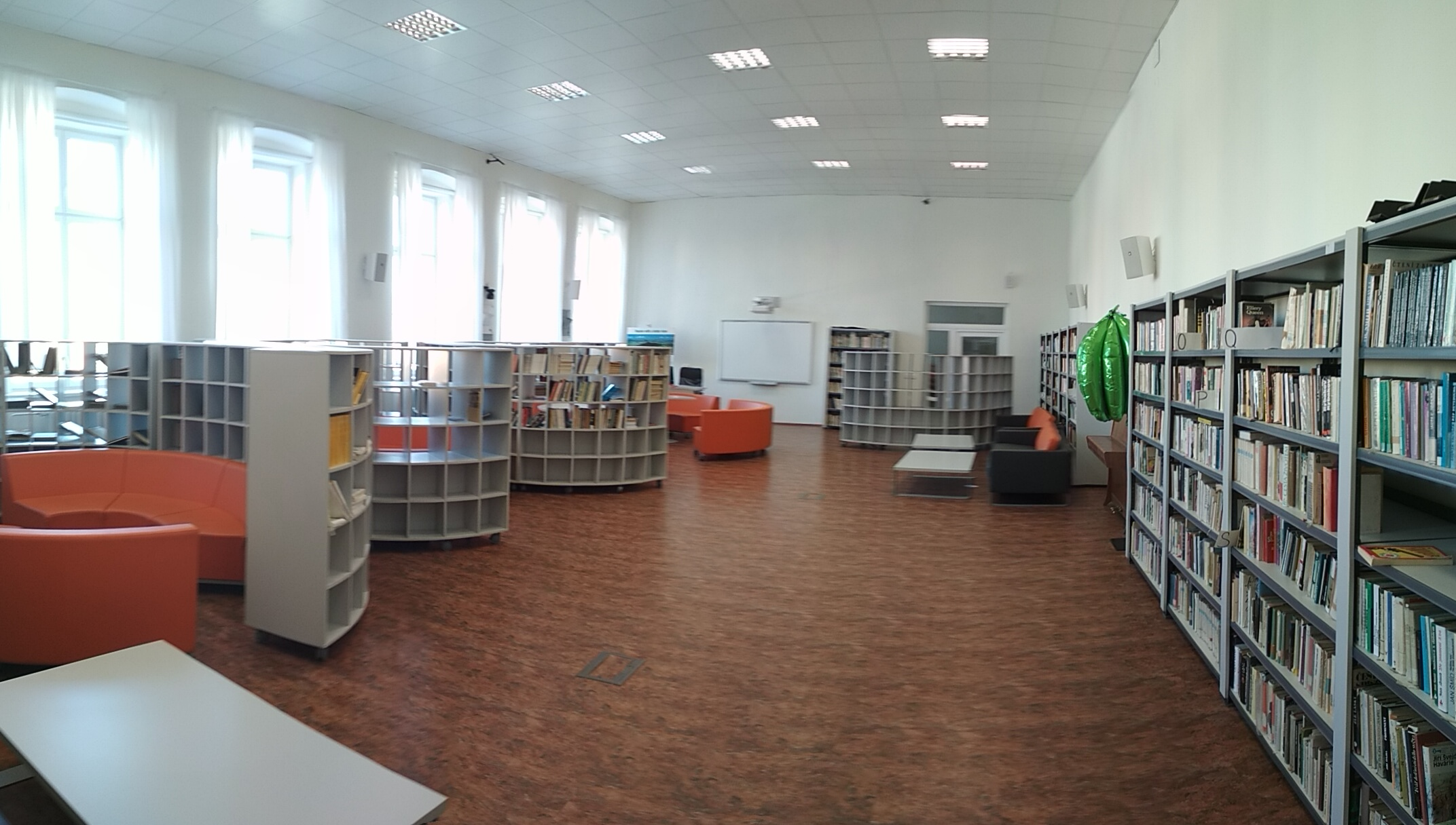 Aula gymnázium Kadaň po rekonstrukci.